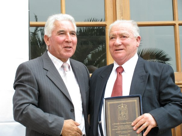 Ceremonia de inauguración del Centro Cultural Agustín Ross, Pichilemu.